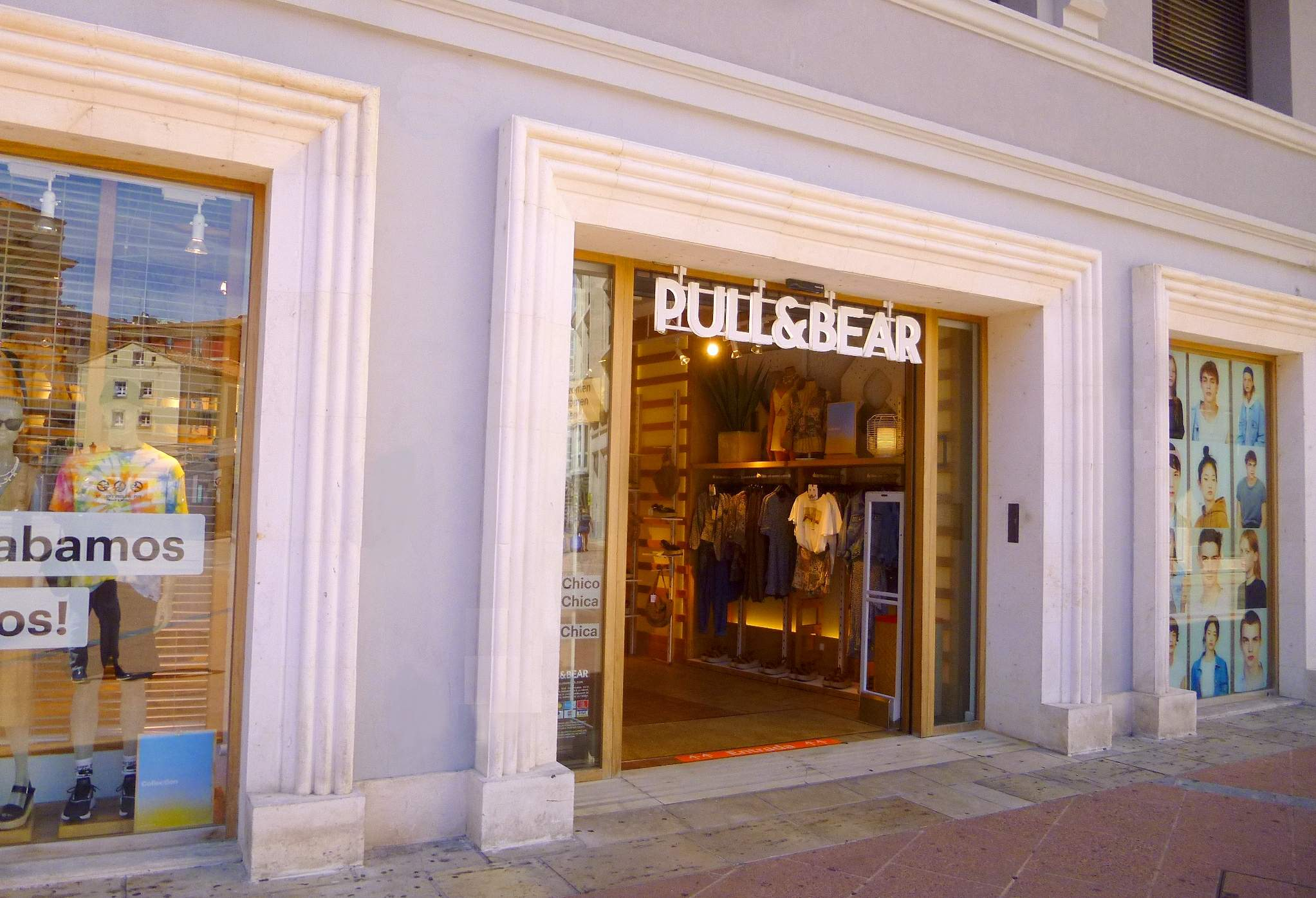 Tienda de Pull & Bear en Burgos